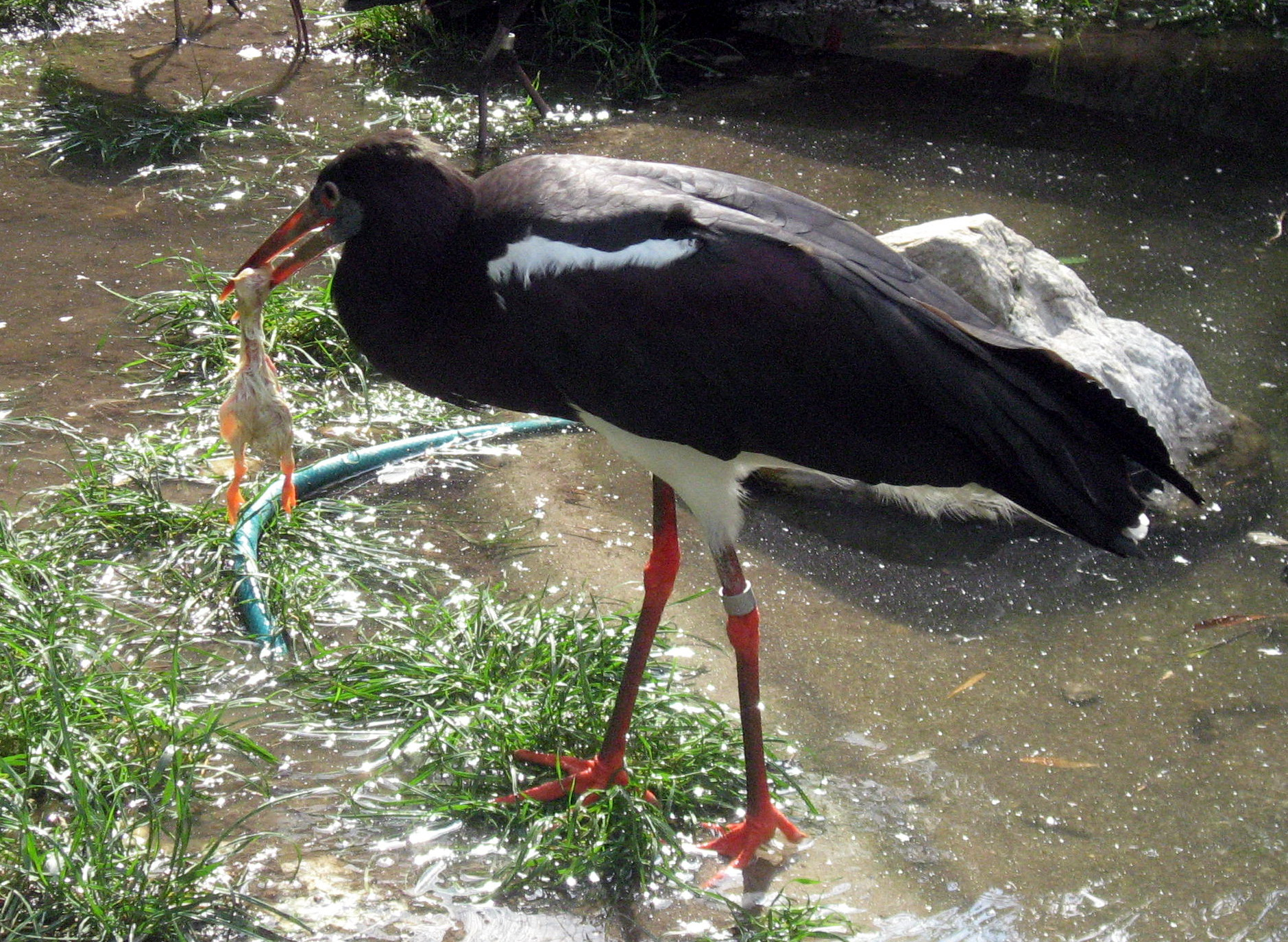 Ciconia abdimii Česky: Čáp simbil